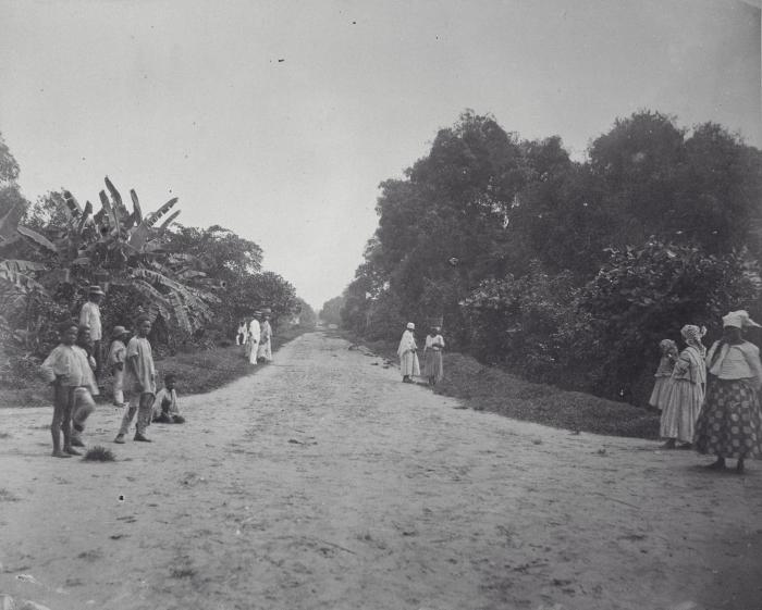 Foto. De Wanicastraat